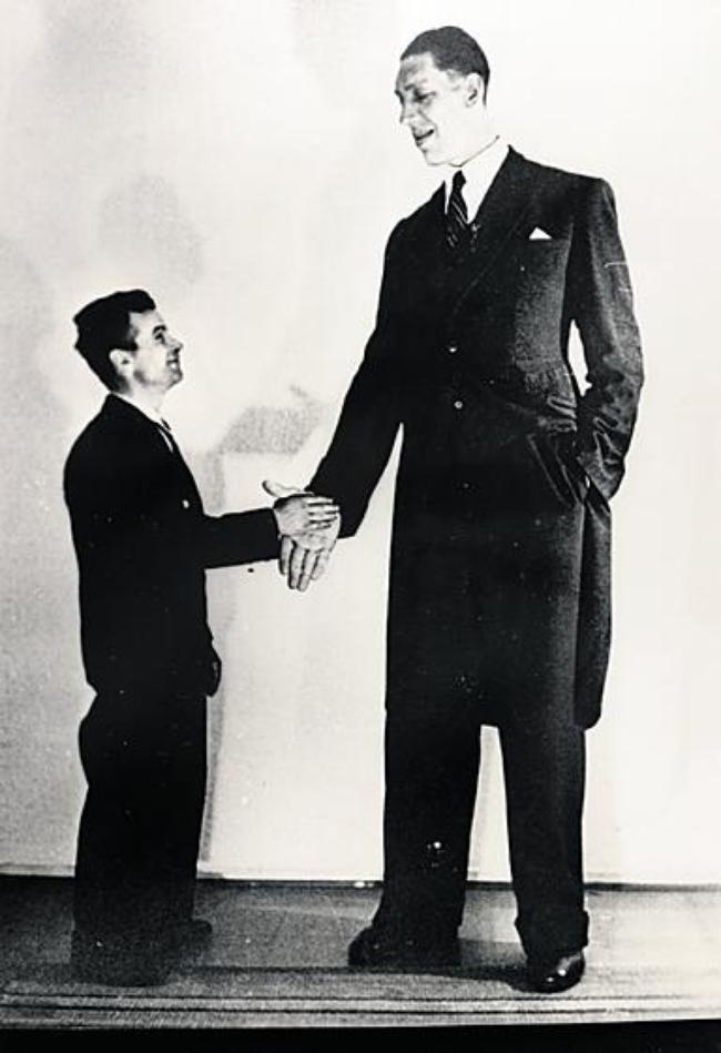 Väinö Myllyrinne (1909-1963) kättelemässä.